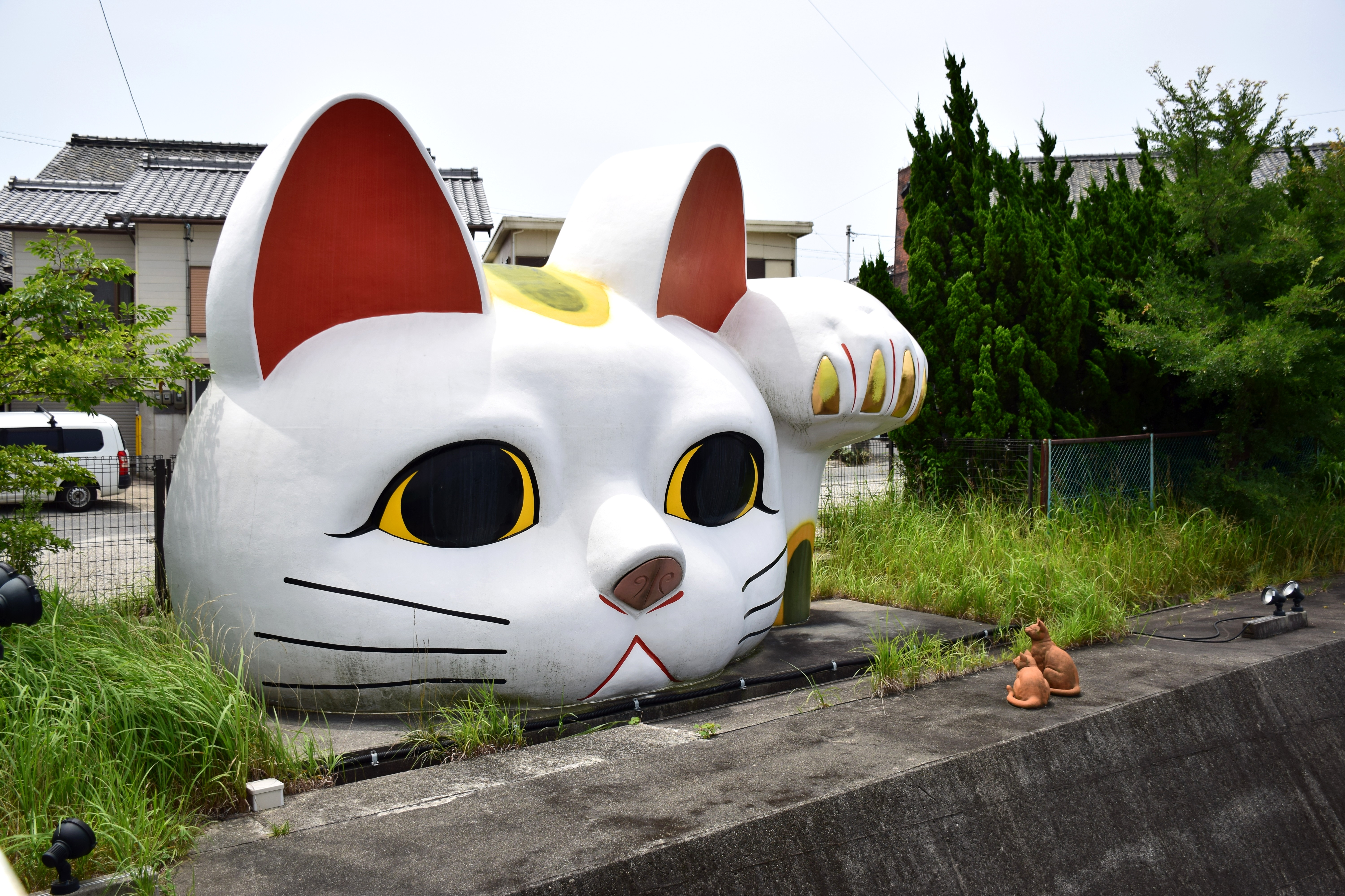 愛知県常滑市のやきもの散歩道にある招き猫「とこにゃん」。